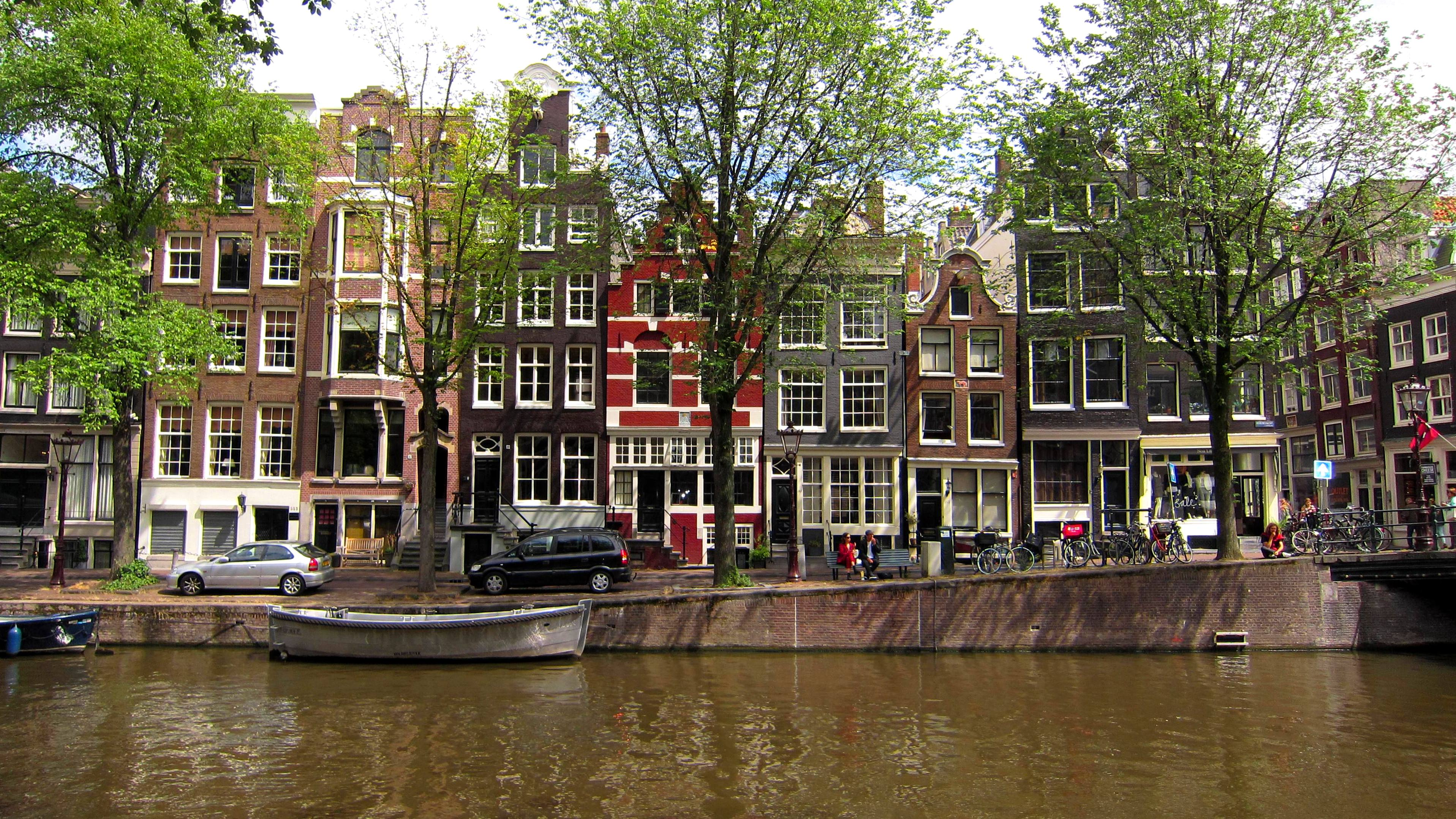 Amsterdam ist auch eine sehr grüne Stadt.